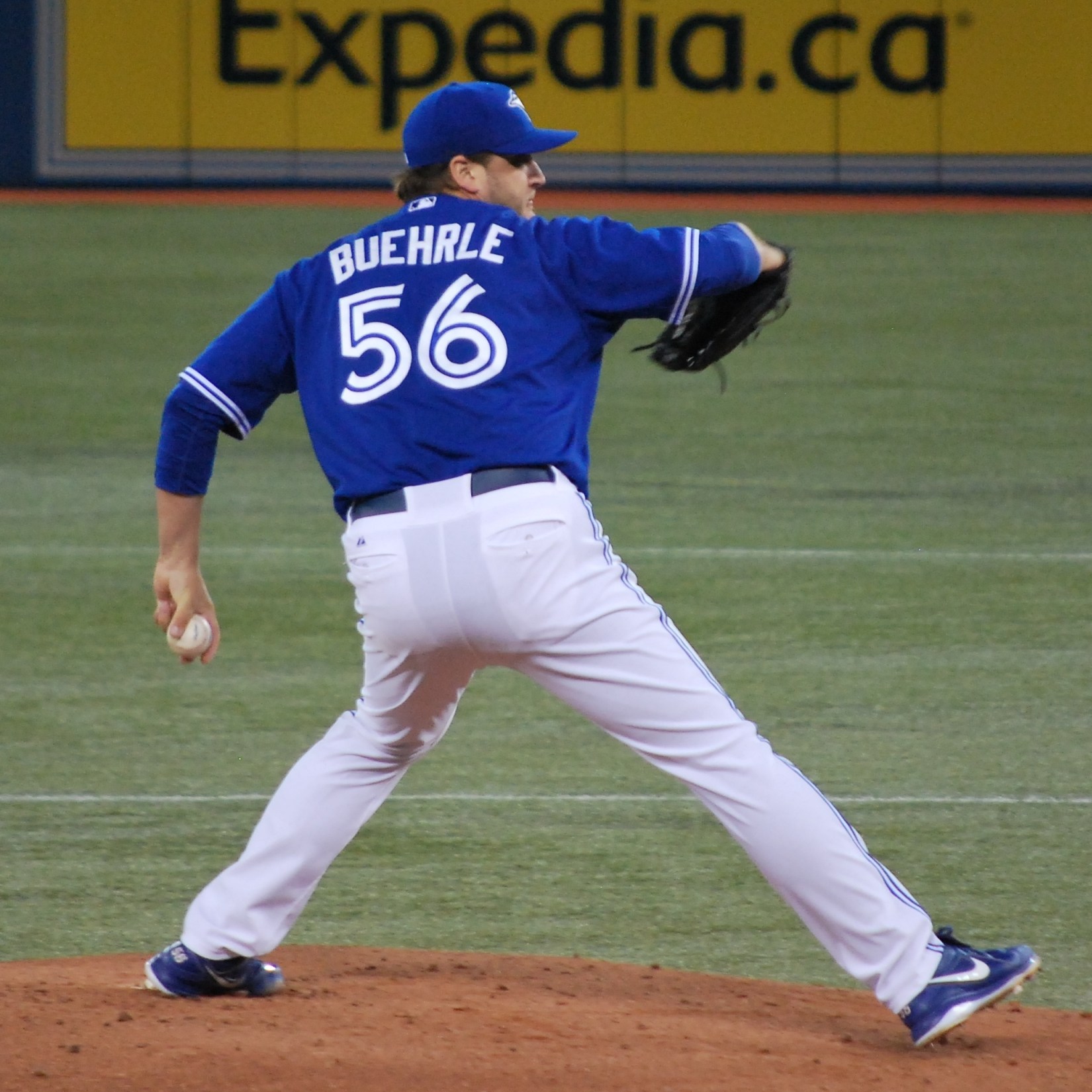 Mark Buehrle